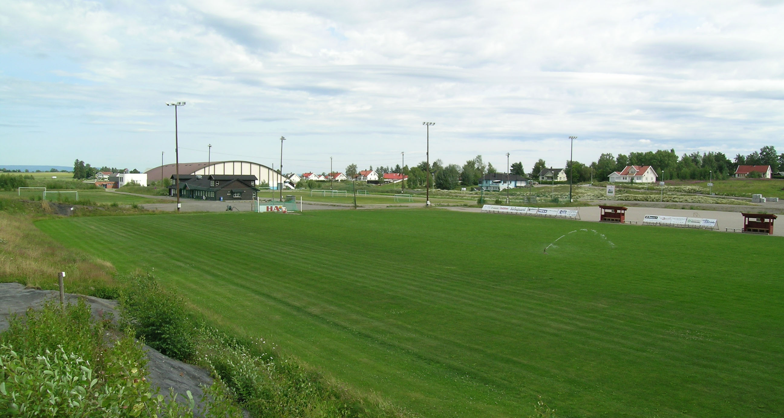 Stange sports ground (Stange idrettspark), Stange, Norway.